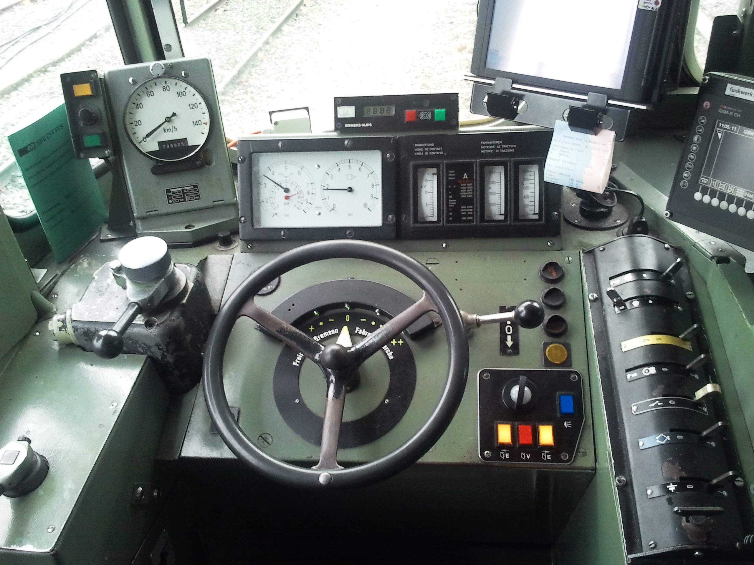 Cabine d'une voiture pilote CFF de type BDt VU I ex ABt De gauche à droite : Robinets de frein direct et du frein automatique; compteur de vitesse, manomètres des conduite générale, d'alimentation et du cylindre de frein; voltmètre de tension de ligne; ampèremètres des moteurs de traction et différentiel, interrupteurs. Au centre : Combinateur traction/freinage; inverseur de marche; diverses témoins et interrupteur d'acquittement.